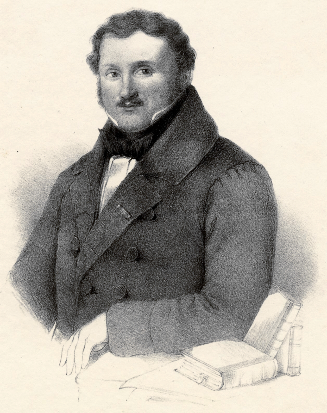 Heinrich August Pierer (1796–1850)